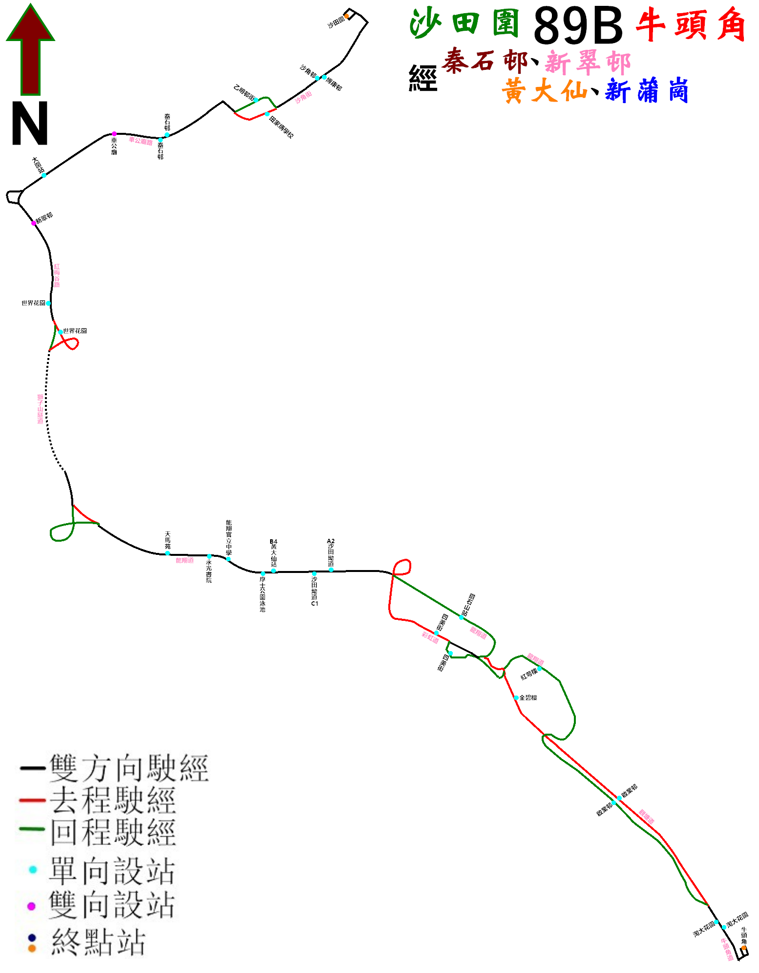 中文（香港）: 九巴89B線的走線圖